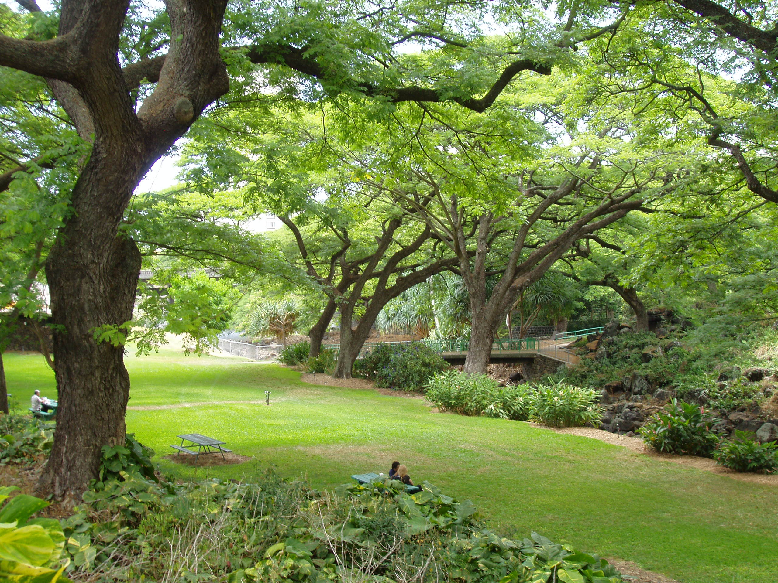 Lili'uokalani Botanical Garden - Honolulu, Hawaii, USA.